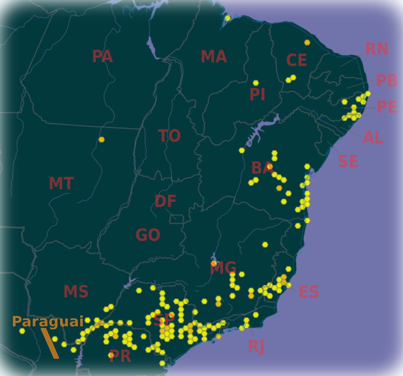 Mapa de distribução gbif de C. floribundus